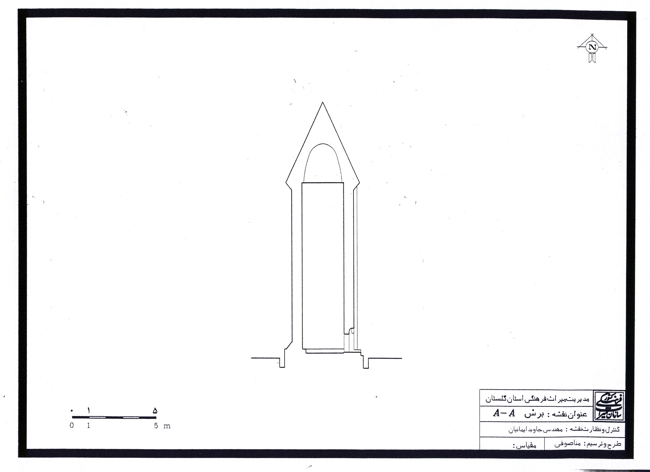 پلان برج قابوس